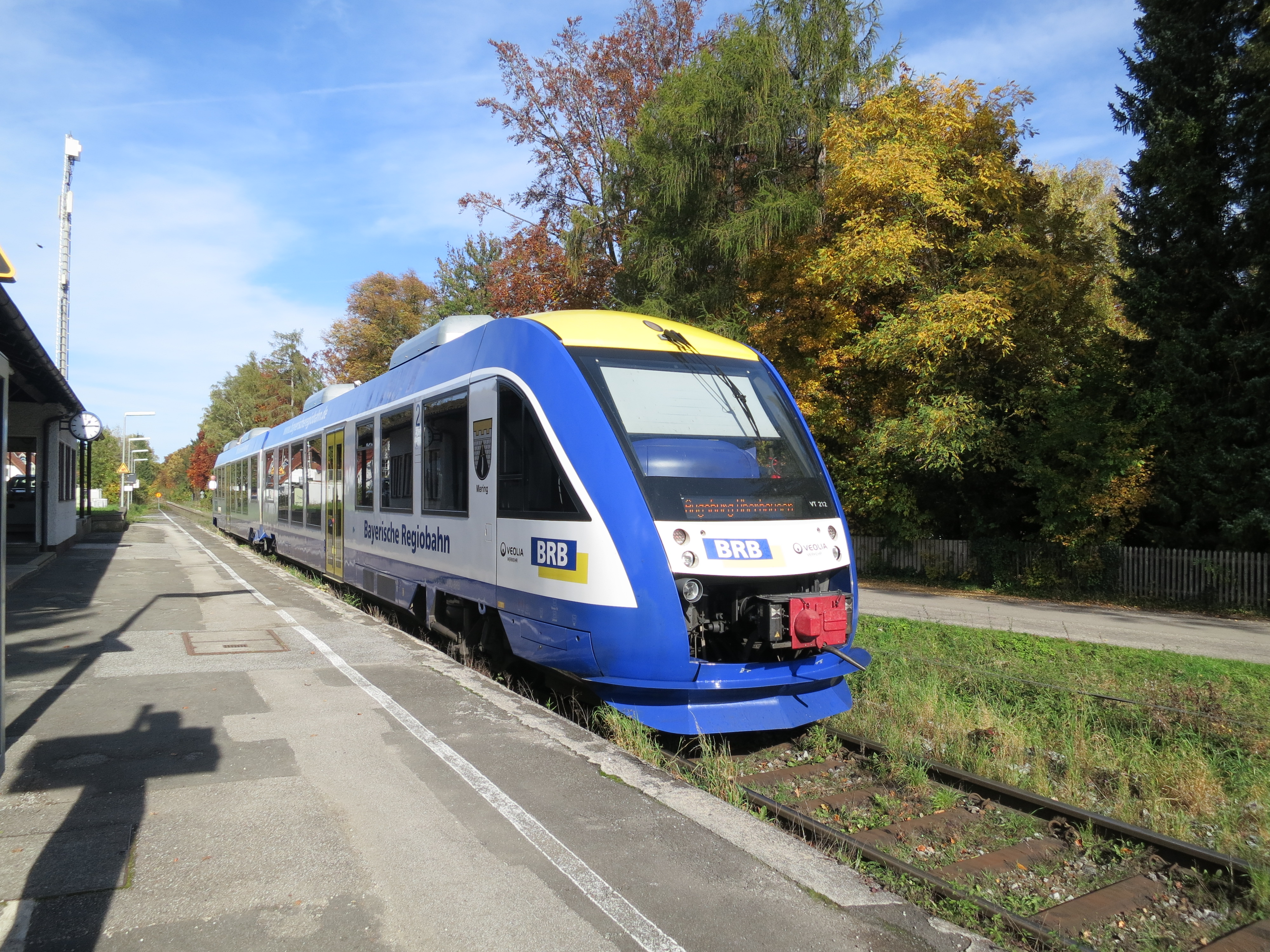 LINT-Triebwagen der BRB im Bahnhof Riederau an der Ammerseebahn